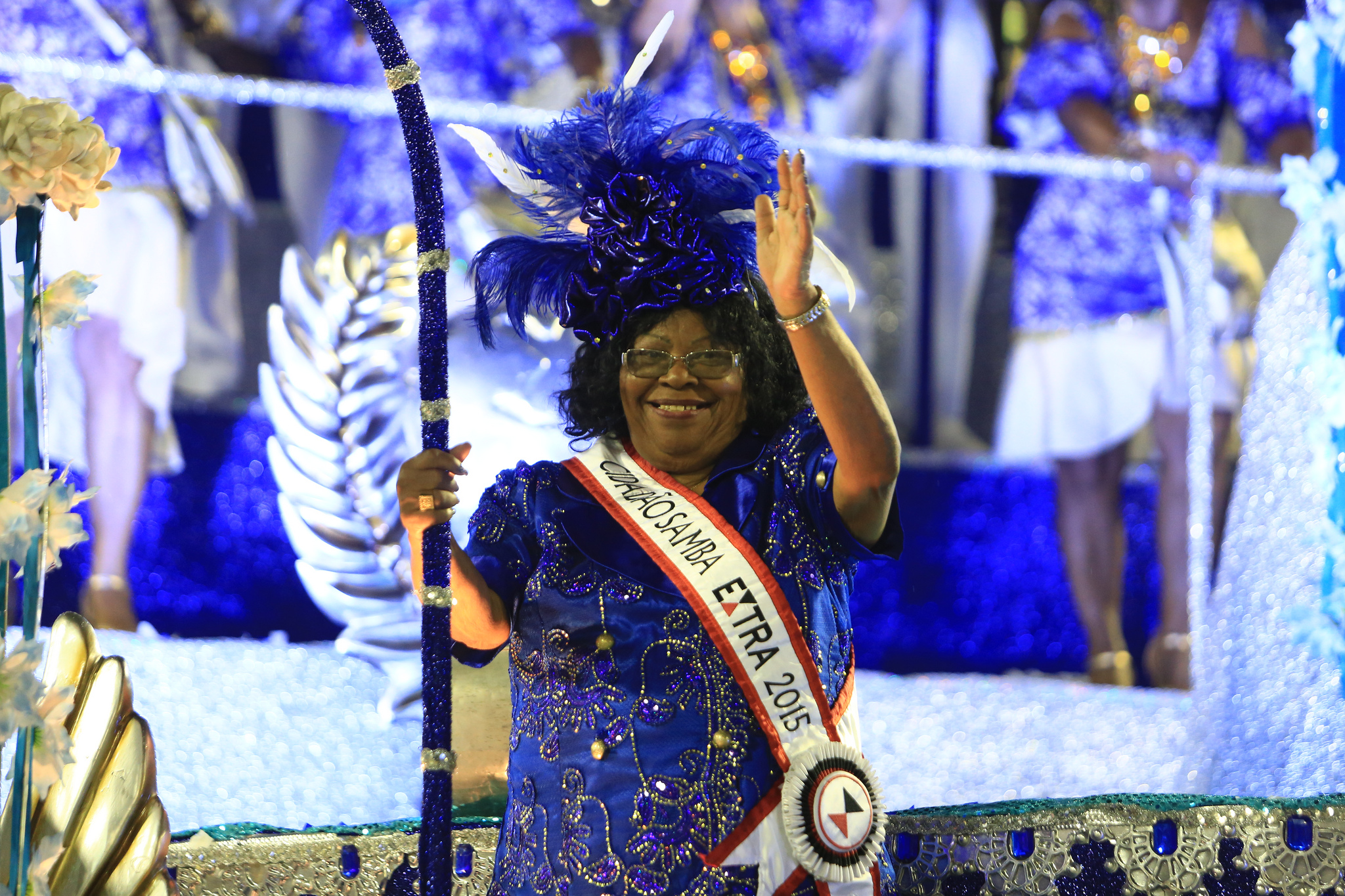 Rio de Janeiro - Desfile de carnaval na Sapucaí. (Raphael David/Agência Brasil)